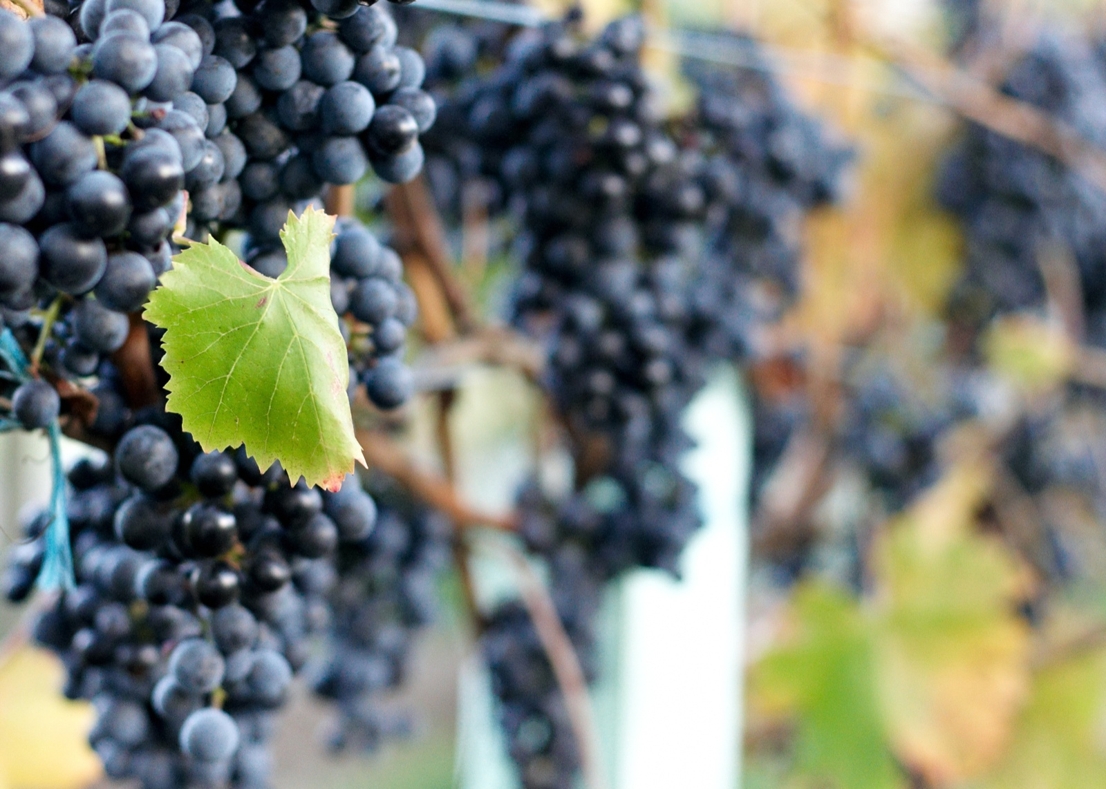 New Zealand Lagrein